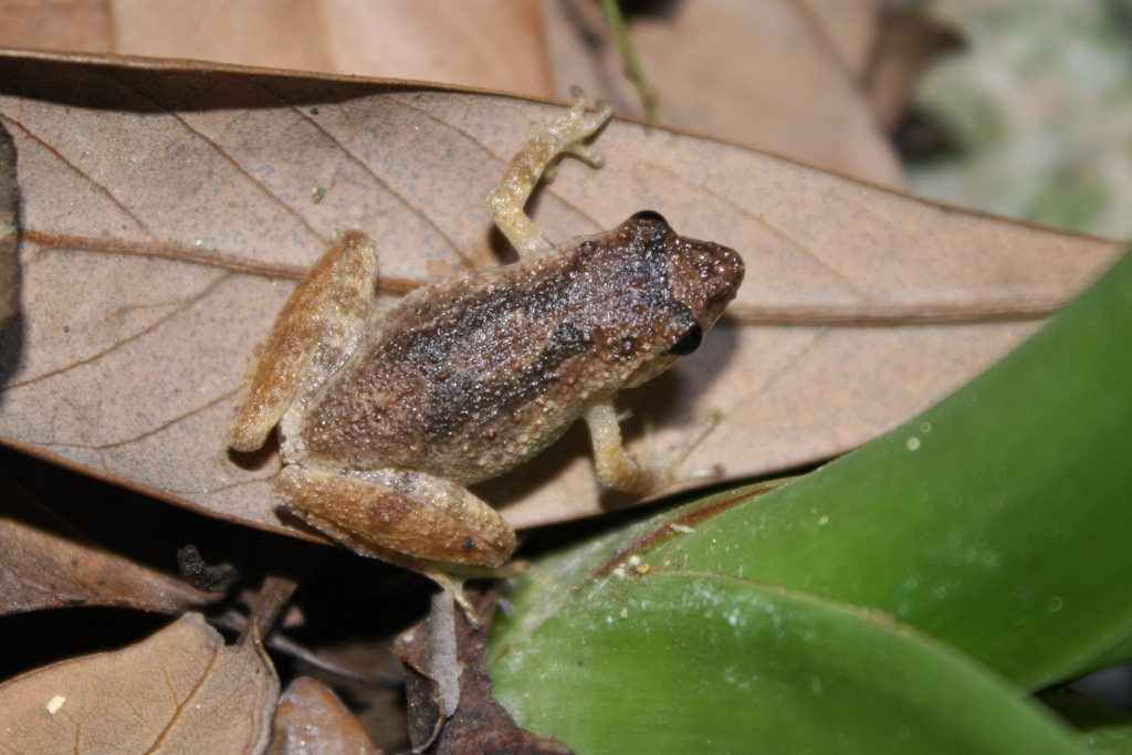 Taken at Ngong Ping, Lantau.